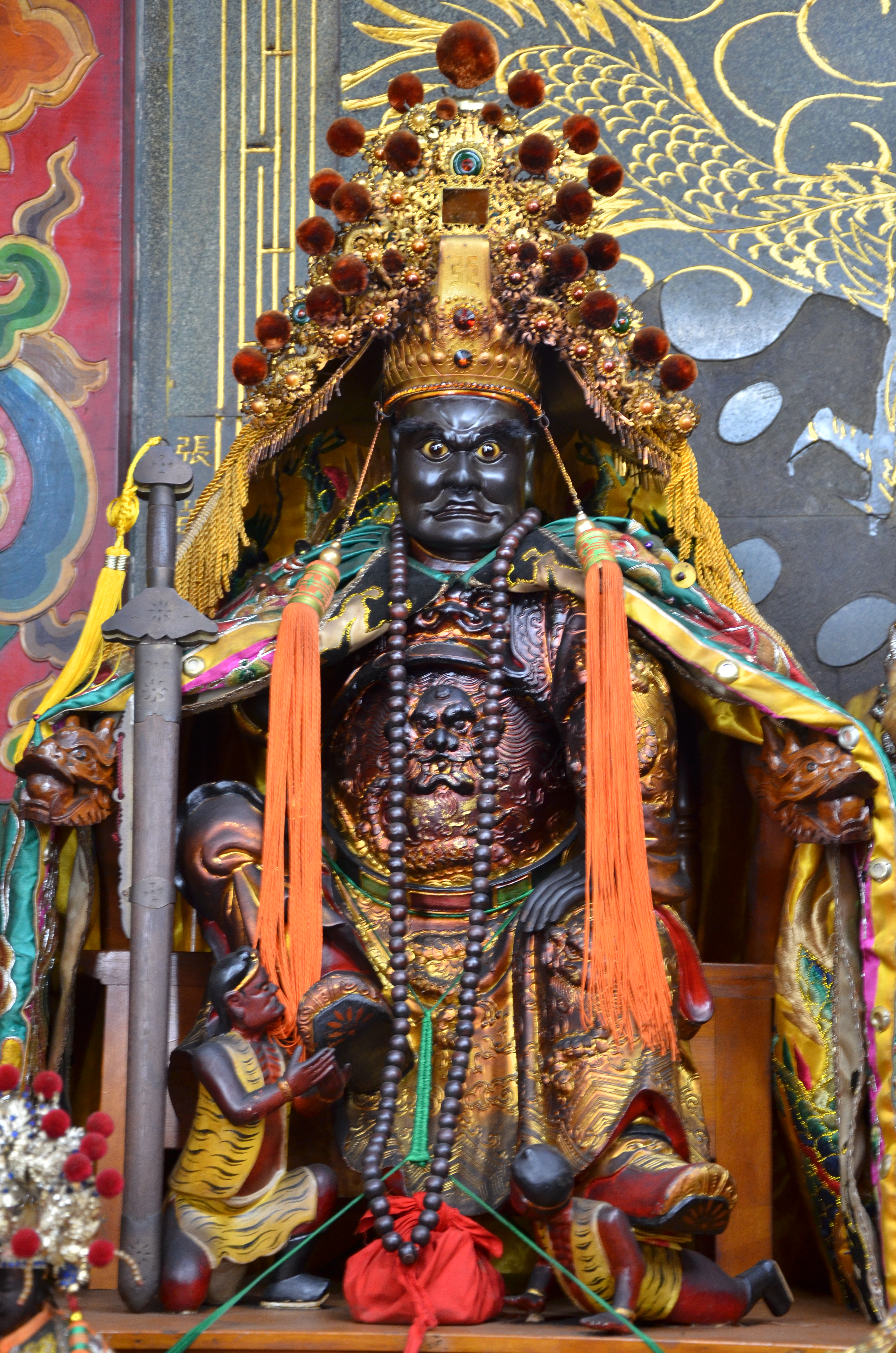 南沙二王